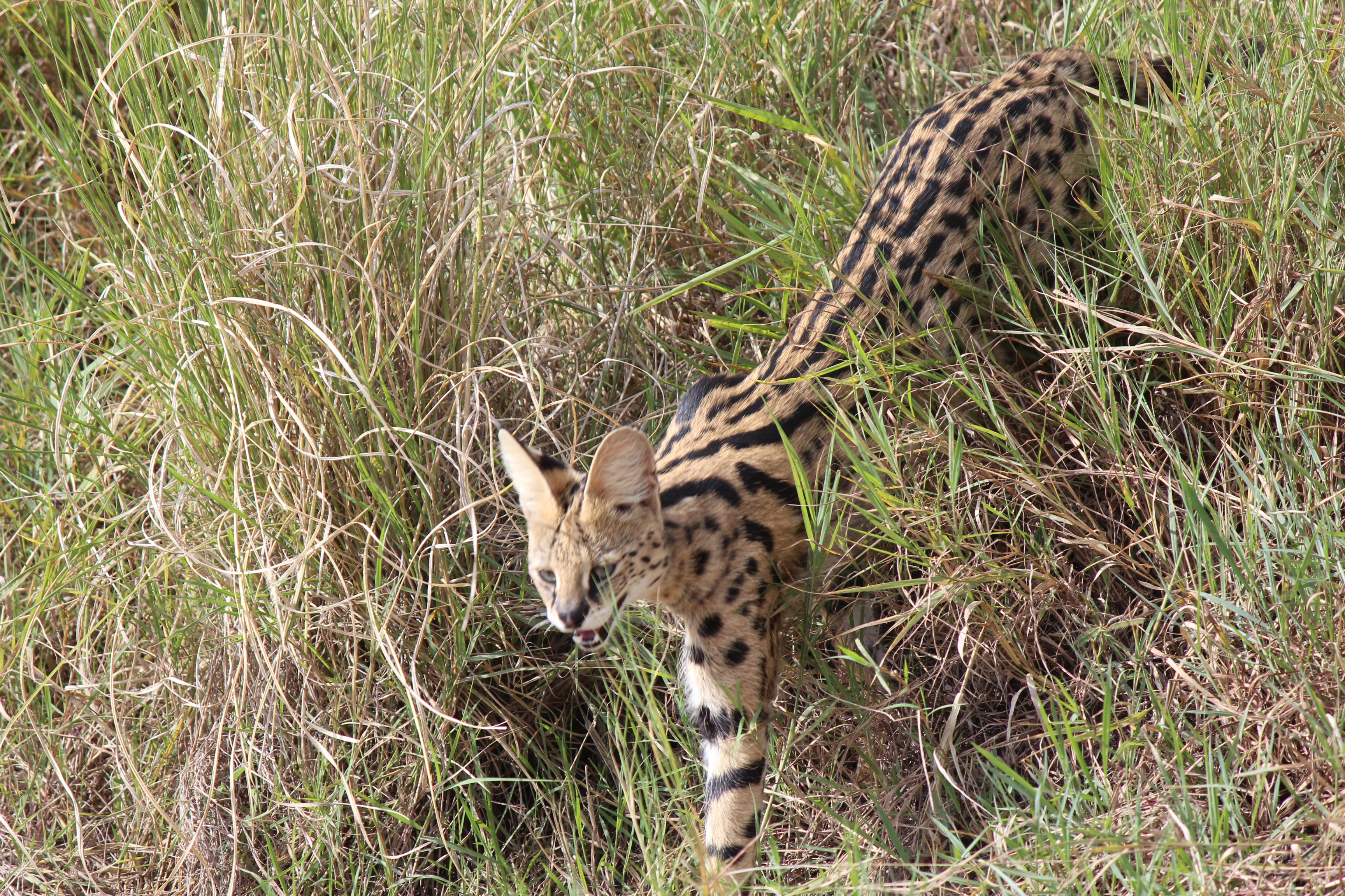 Leptailurus serval in Maasai Mara national reserve, Kenya